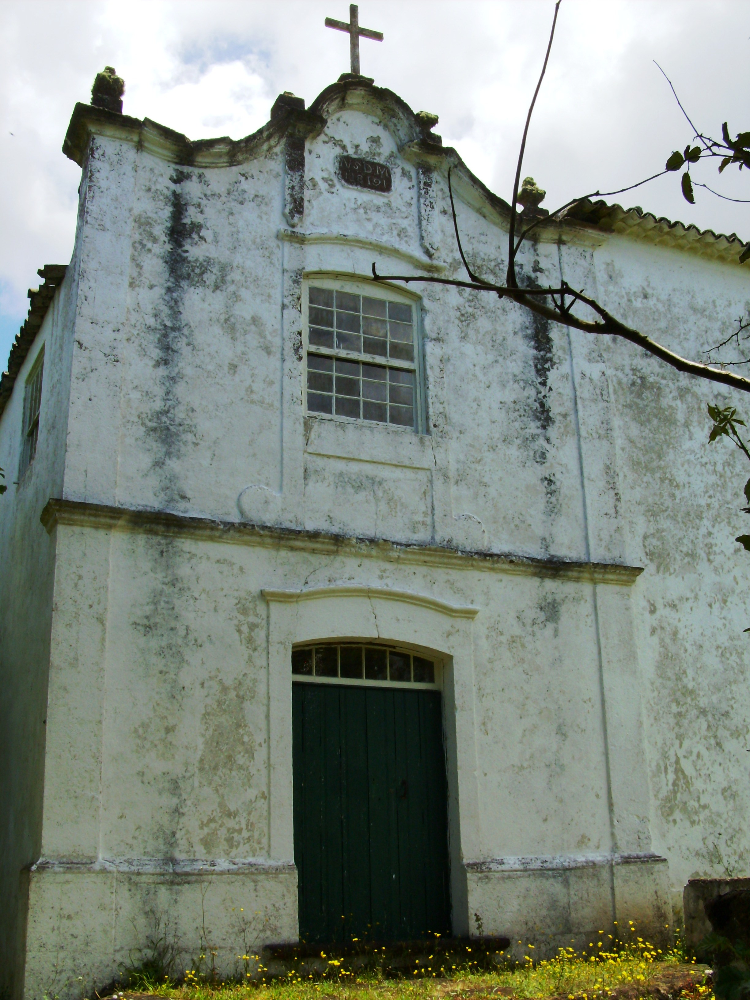 Ermida de Nossa Senhora do Monte, Ilha de Santa Maria (Açores), Portugal.